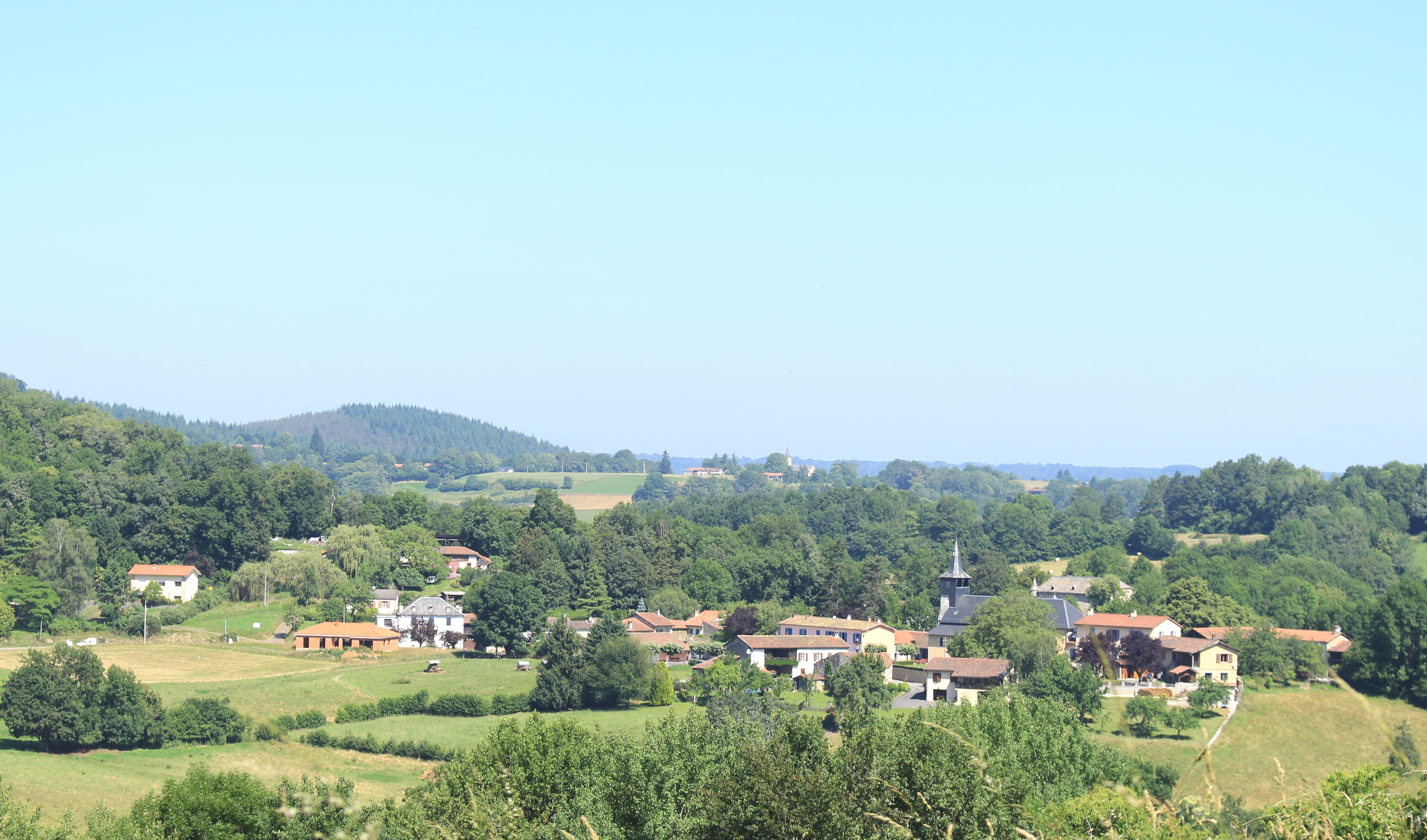 Bize (Hautes-Pyrénées)